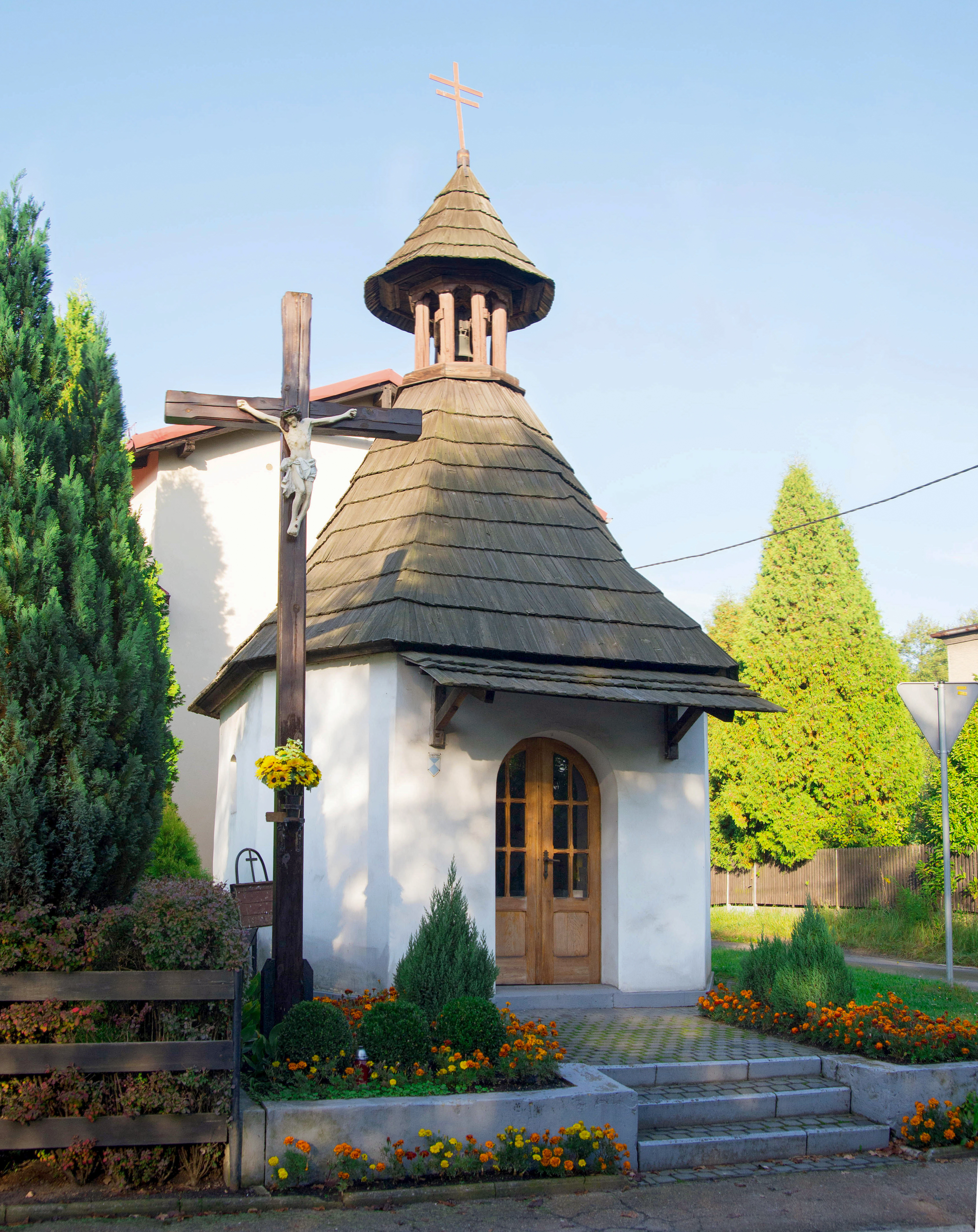 Tarnowskie Góry, kaplica, poł. XVIII w.